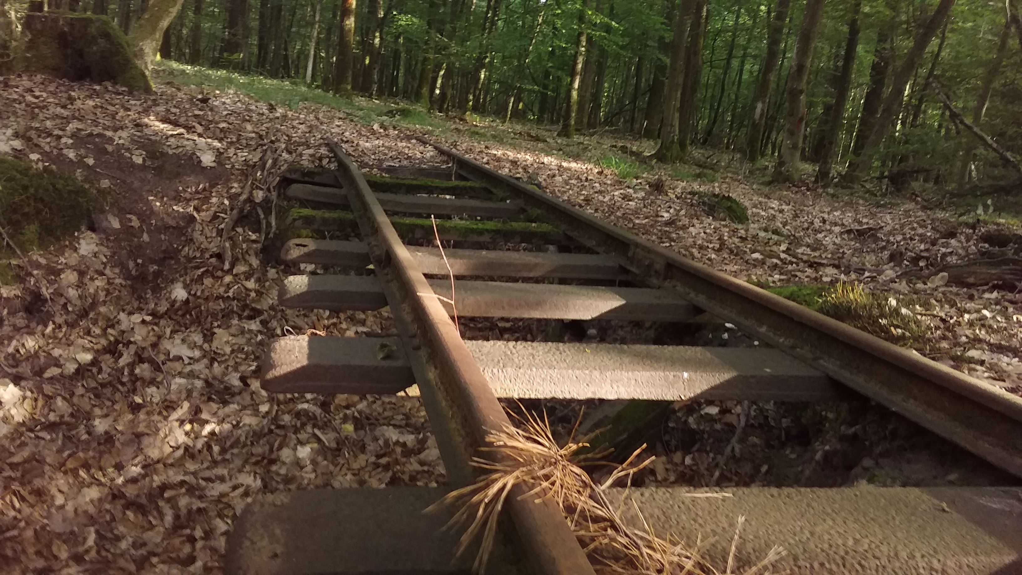 Chemin de fer militaire menant au camp de Neubourg.